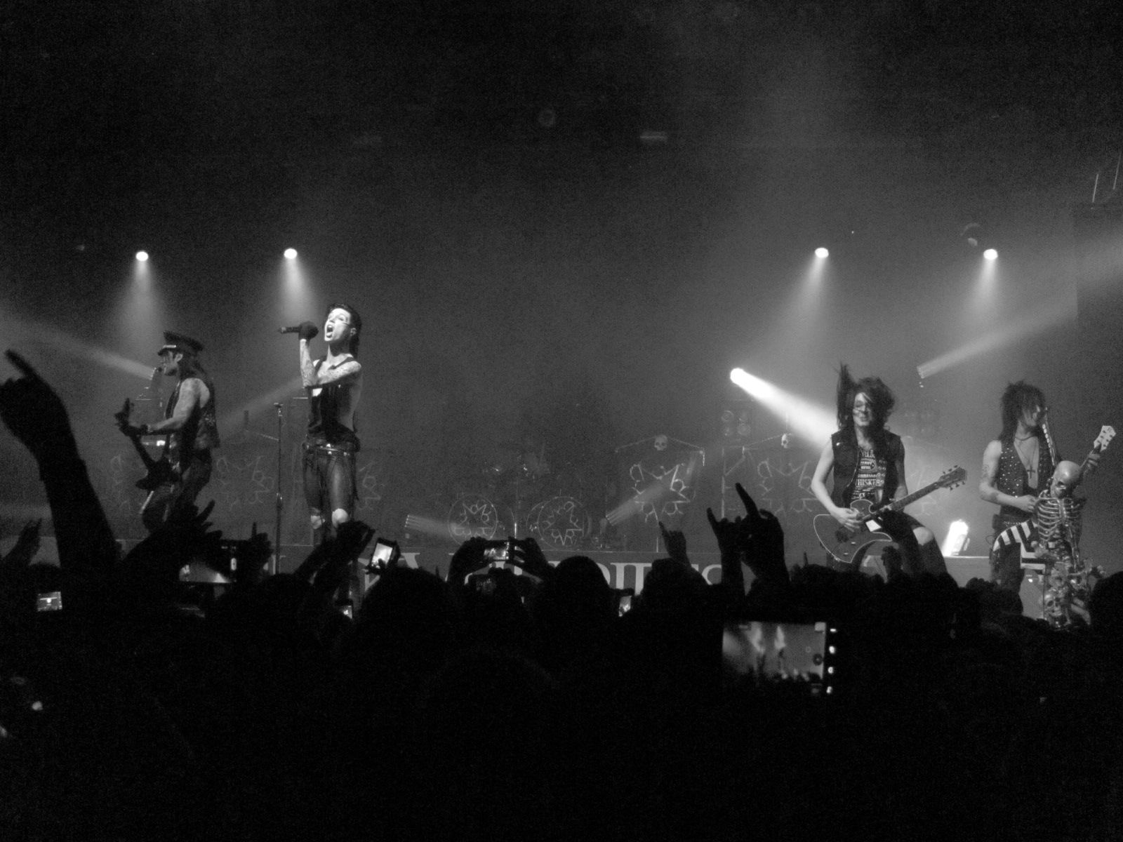 Concierto de la banda Black Veil Brides el 25 de enero de 2013 en Nueva York. En la imagen: Ashley Purdy, Andy Biersack, Jake Pitts y Jinxx.